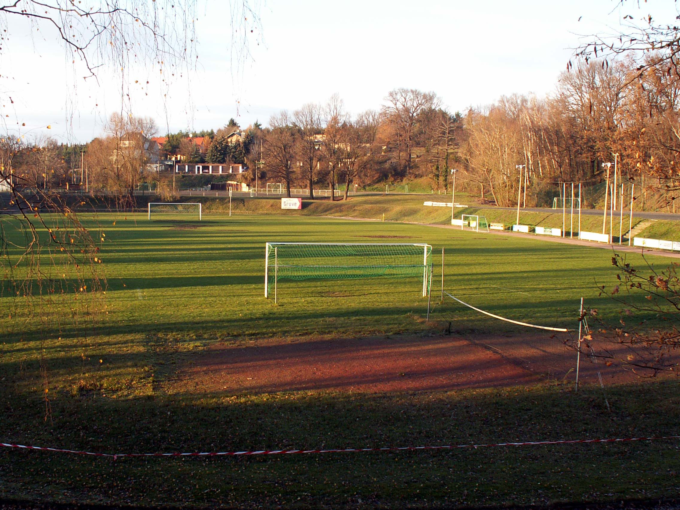 Friedrich-Ludwig-Jahn-Sportplatz in Weinböhla